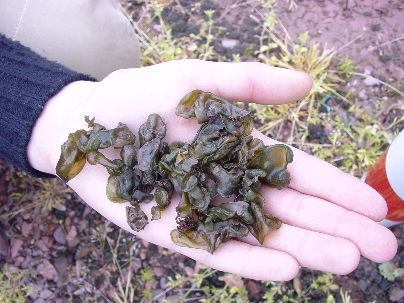 Nostoc, trouvé sur un chemin de schistes (zone régulièrement chimiquement désherbée ) près de la Dêule canalisée, à Lille (lieu : écluse du grand carré).